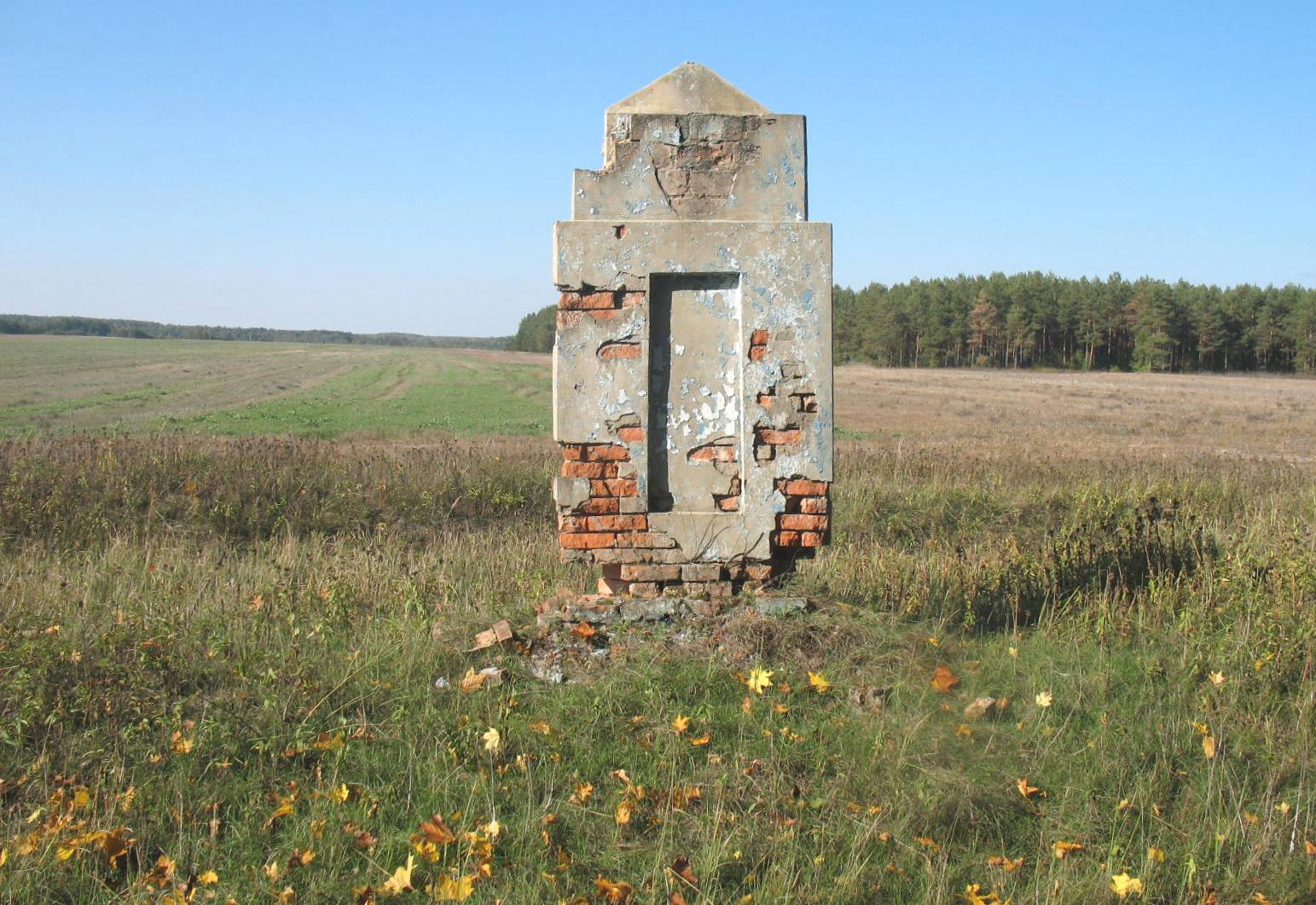 Старый памятник 210 евреям деревни Поддобрянка Марковичского сельсовета Гомельского района Гомельской области Белоруссии, убитым нацистами в августе 1941 года. В 2011 году заменен на новый.